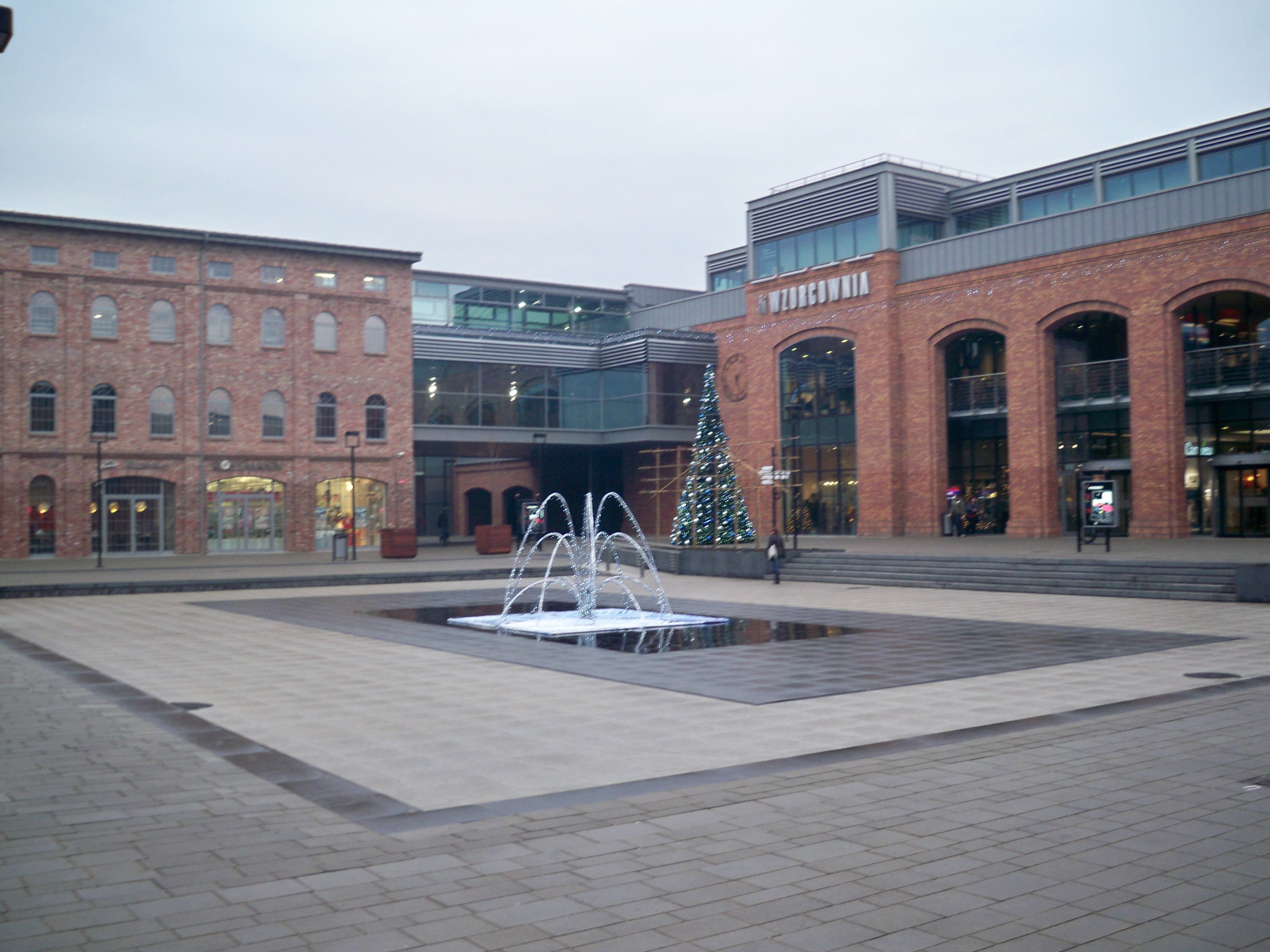 Wzorcownia (2009 r.)